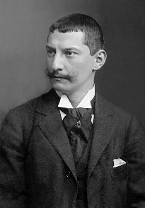 Portrait des Malers Martin Brandenburg, 1900